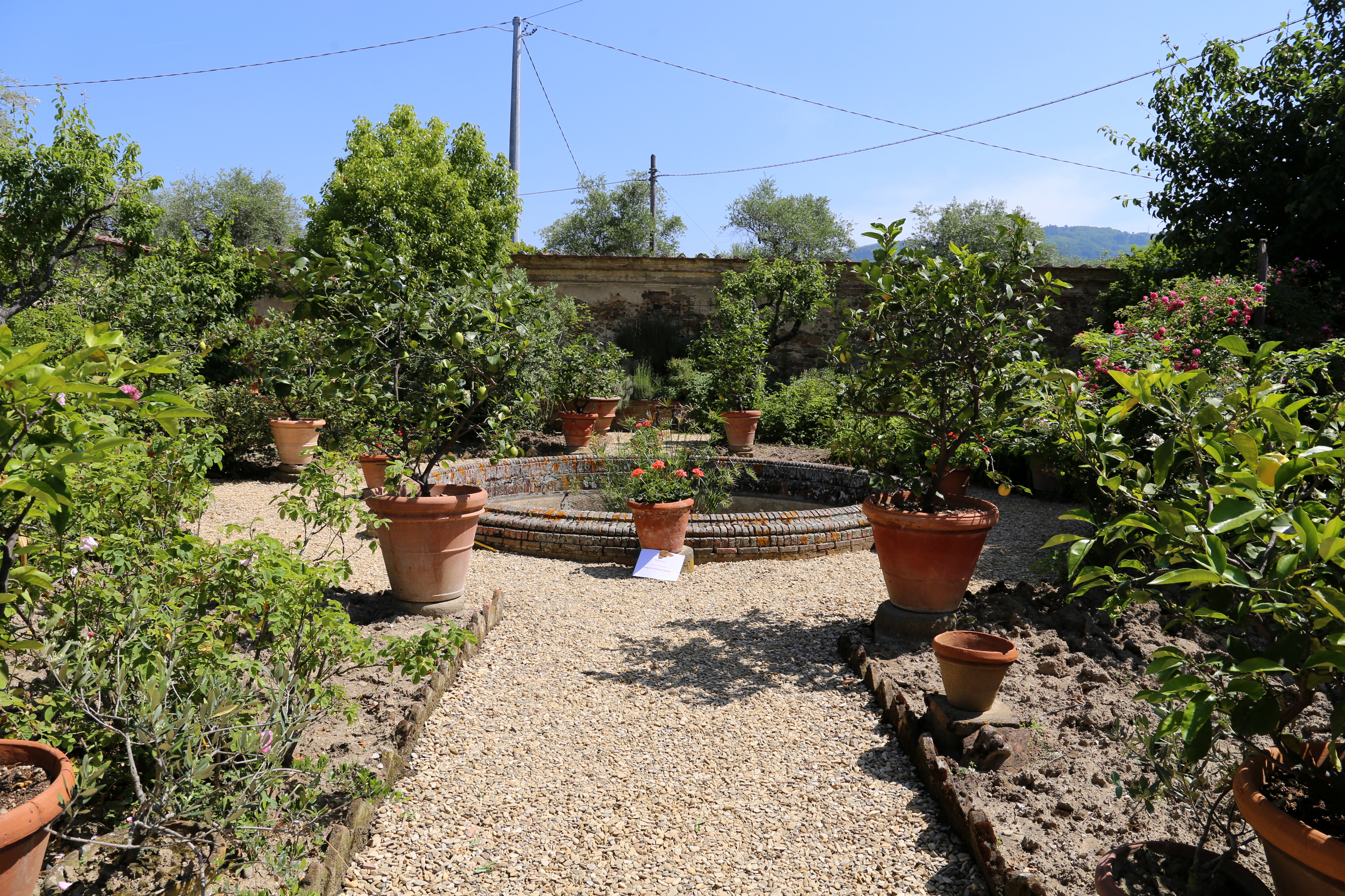 Giardino della Villa Guardatoia This is a photo of a monument which is part of cultural heritage of Italy.